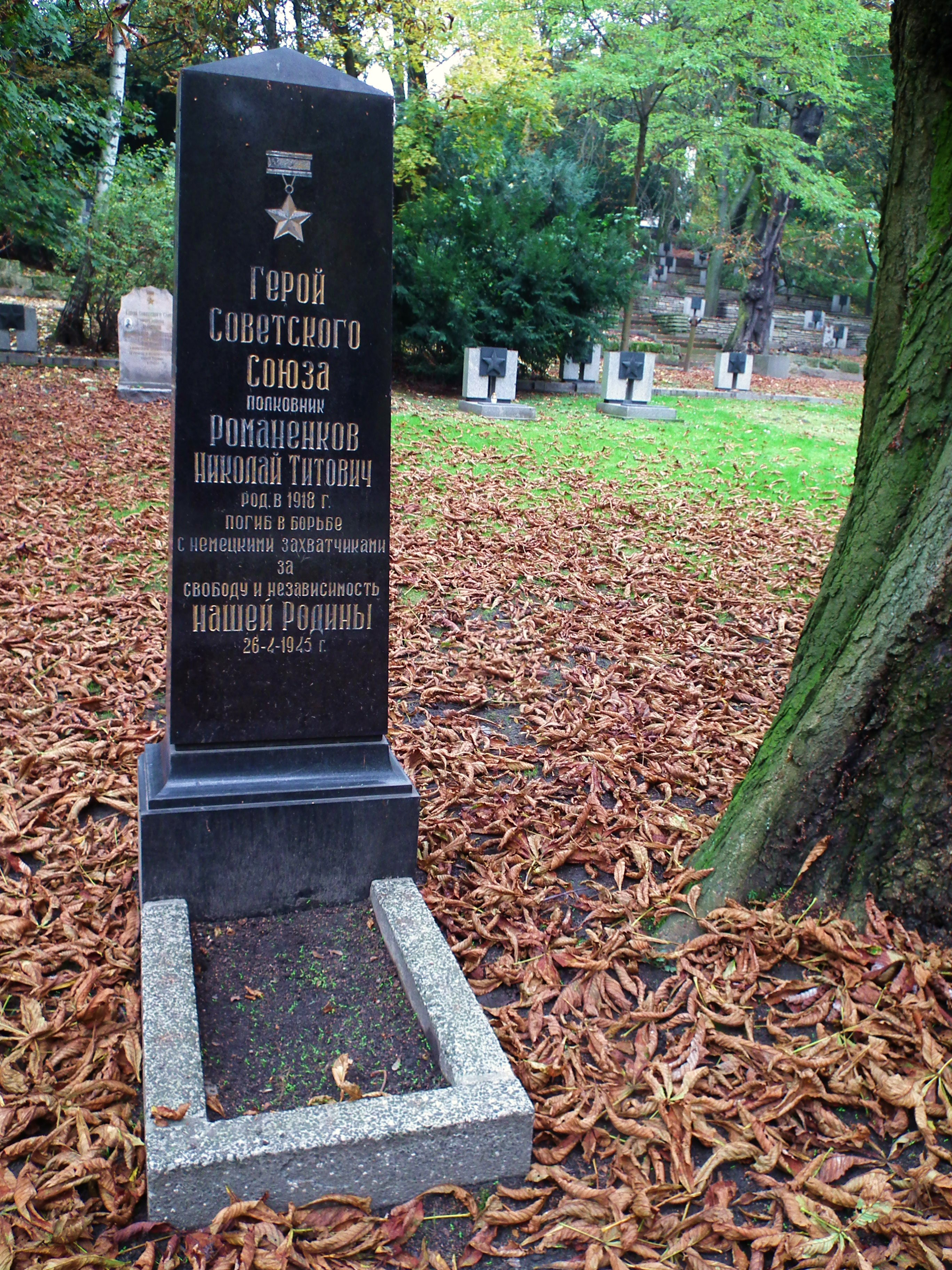 Grób: Nikołaj Titowicz Romanienkow (ros. Николай Титович Романиенков). Cmentarz sowiecki na stokach poznańskiej Cytadeli.